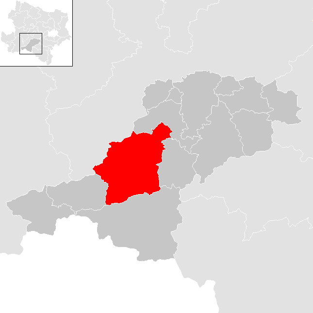 Bezirk Lilienfeld